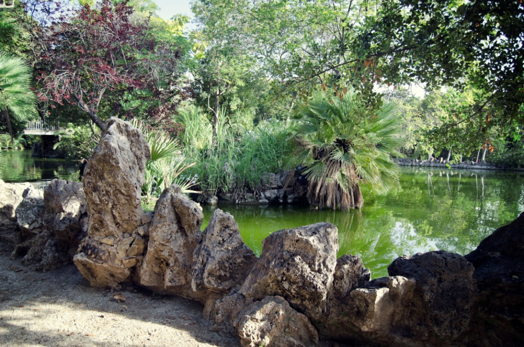 Parc del Llac, al Masnou (Maresme, Catalunya).